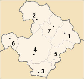 Sujet : carte des obchtini (municipalités) de l'oblast de Razgrad, en Bulgarie Auteurs : Потребител:Ljubo (Любомир Таушанов = Lyoubomir Taouchanov), pour la version originale en bulgare, Utilisateur:Hégésippe Cormier, pour l'adaptation française (repères chiffrés) Source : Картинка:Razgrad Oblast map.PNG (7 mai 2005) Licence